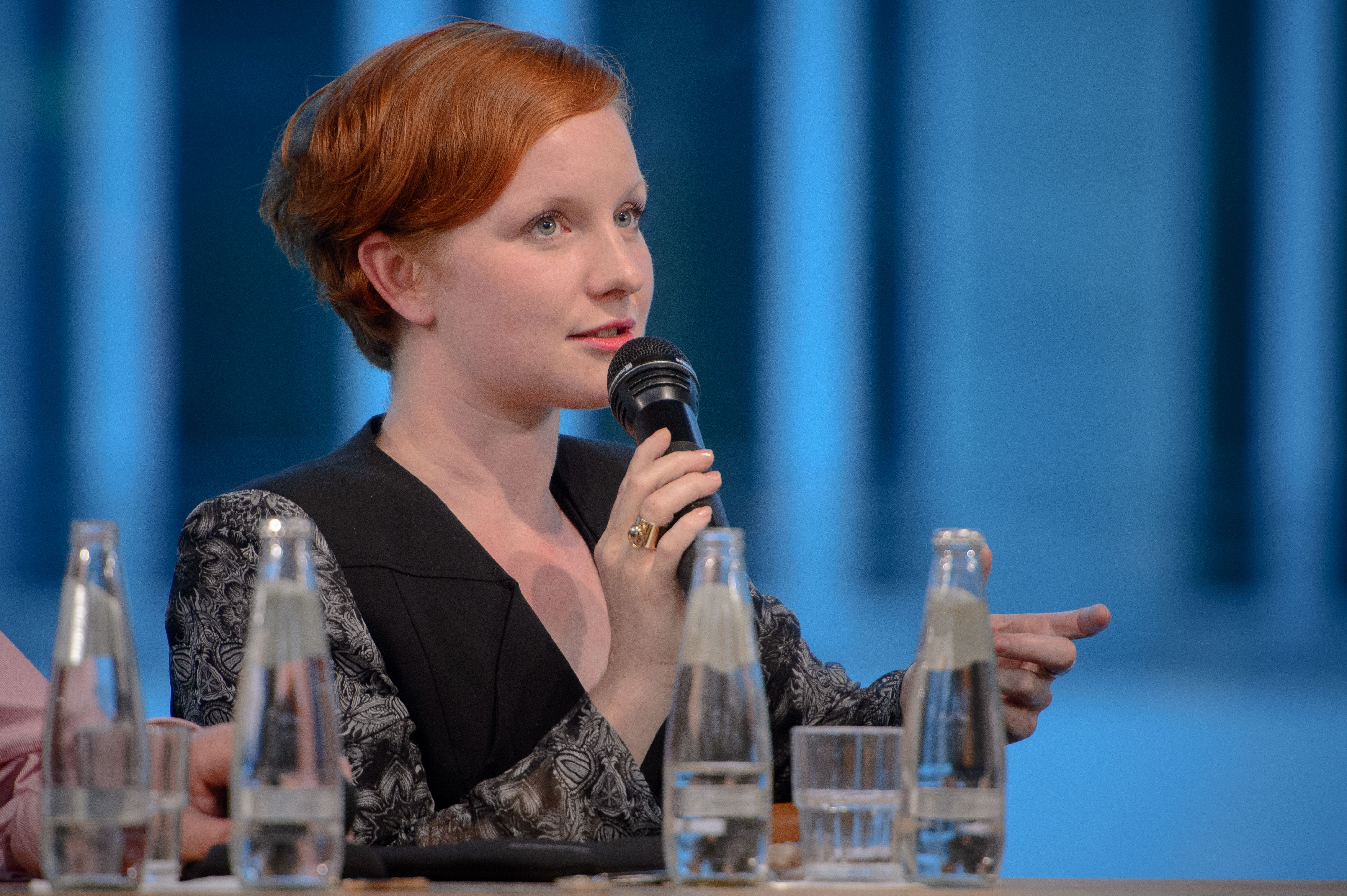 Teresa Bücker (Autorin, Netzaktivistin und Redaktionsleiterin EDITION F.), Foto